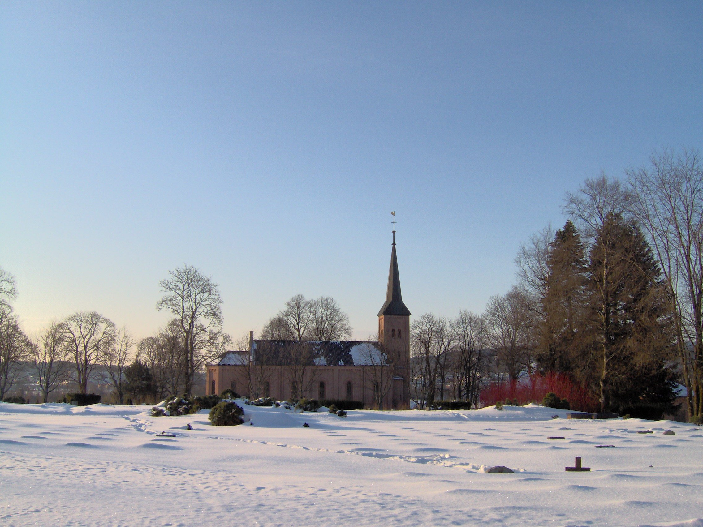 Bryn church in Bærum, Norway